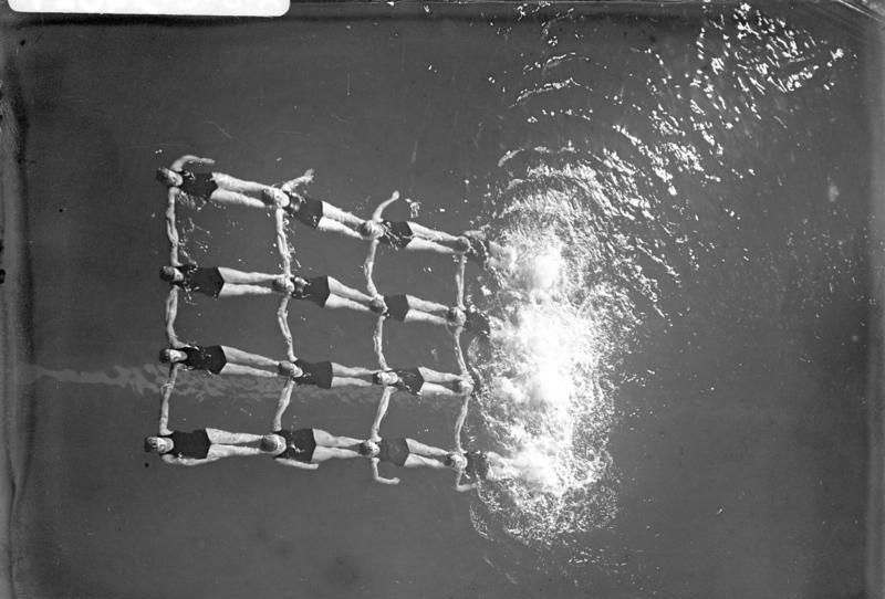 Figurenschwimmen des Berliner Damenschwimmklubs "Nixe" im Wellenbad im Lunapark in Berlin ! Das Anschwimmen zum Figurenreigen. Zu einem geschlossenen Rechteck vereint starten die Schwimmerinnen zum Reigen.